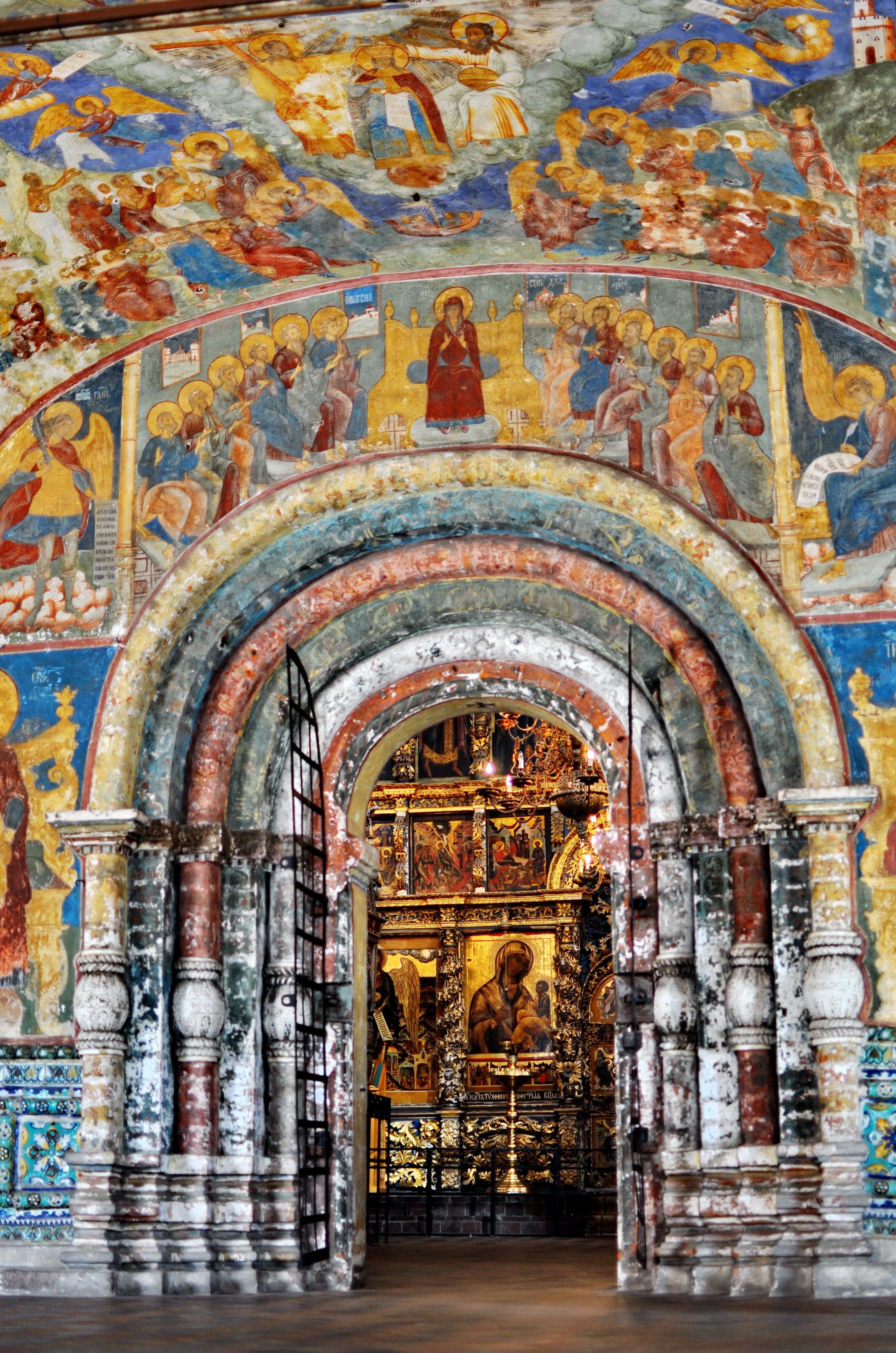 Комплекс церкви Ильи Пророка (Ярославская область, Ярославль, Советская площадь)